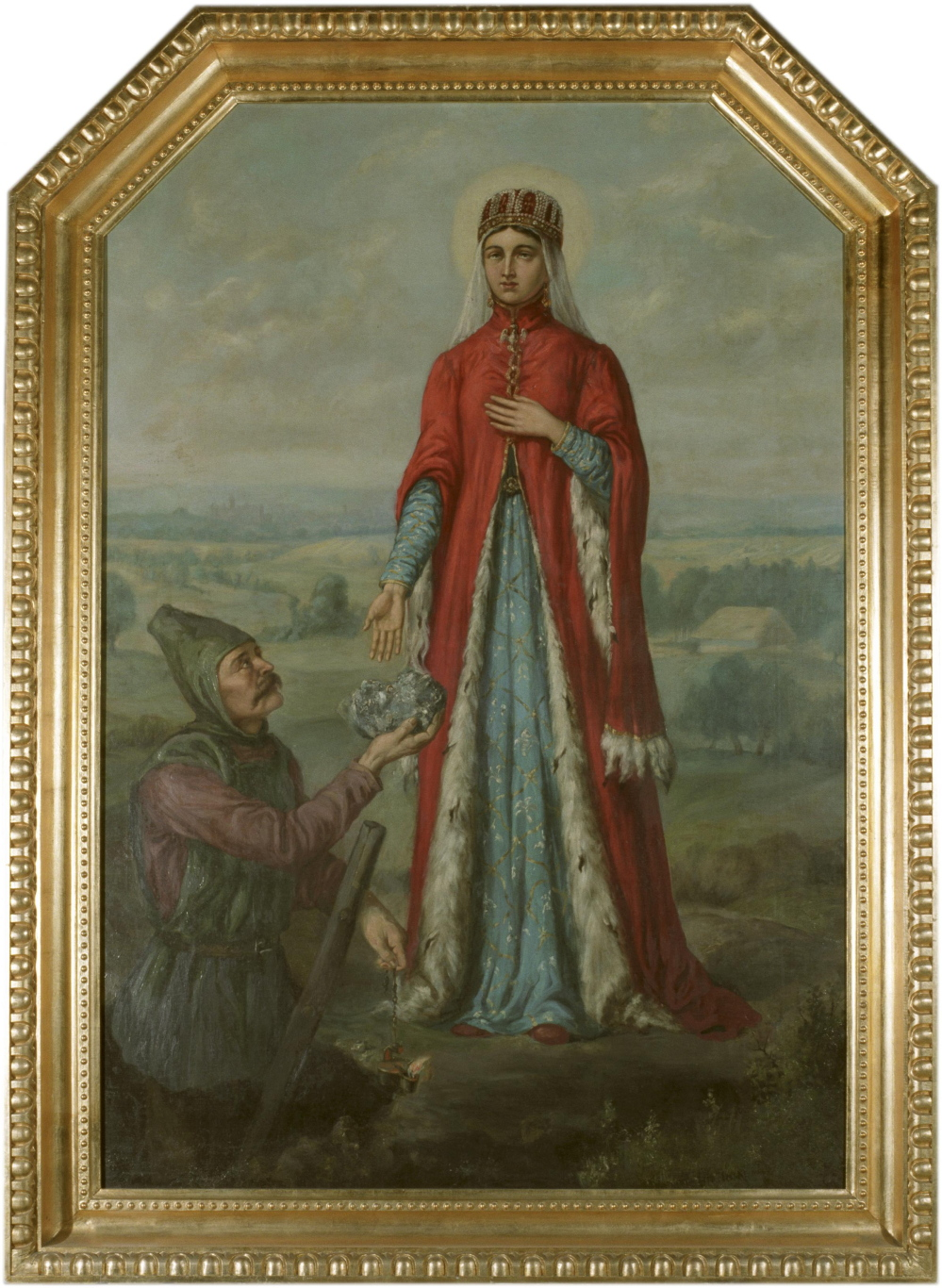 Legenda świętej Kingi